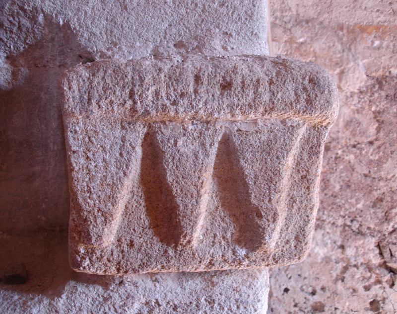 Eglesia de Sant Julià de Boada (Girona, Catalunya, Espanya) - Relleu a l'alçada de la línia d'imposta a l'arc de l'absis.